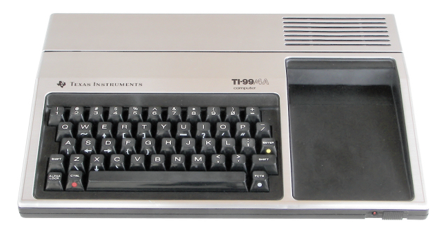 Foto eines Texas Instruments TI-99/4A (Vorderansicht)